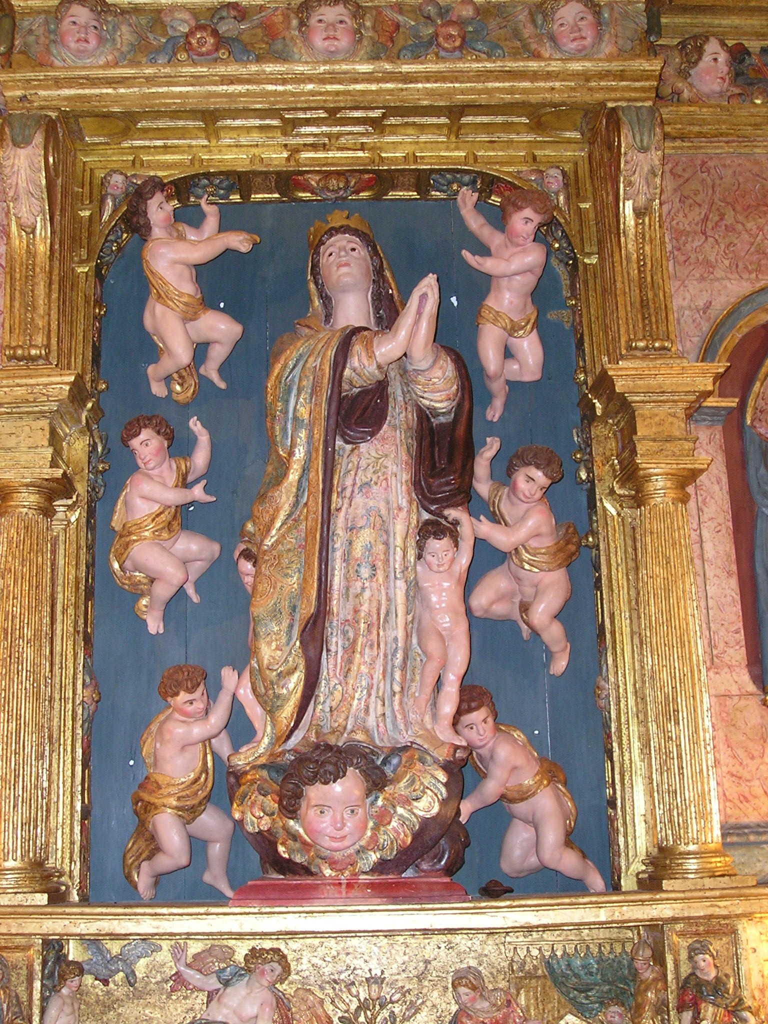 Virgen de Pontón, Burón (León), España